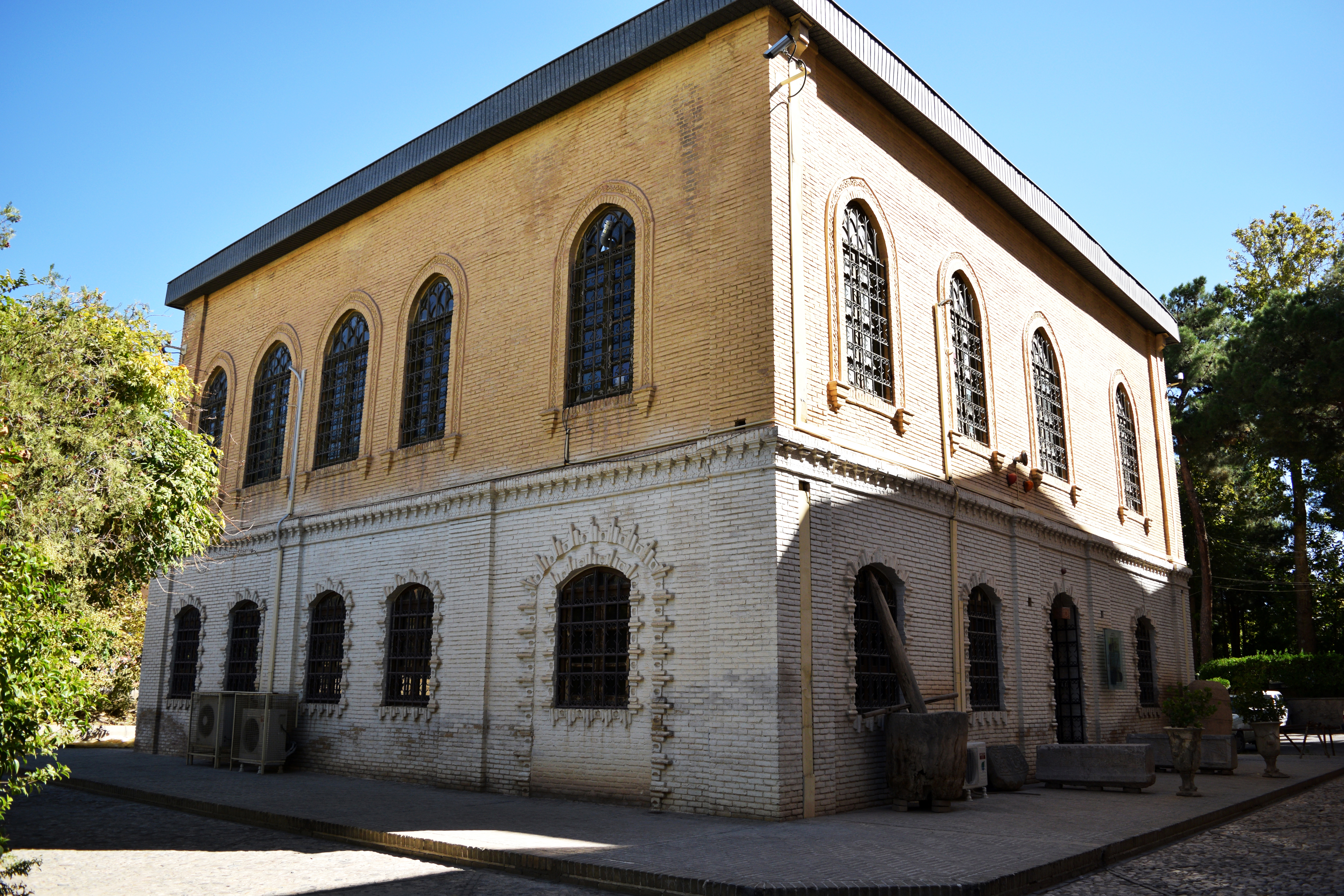 پارک موزه شاهرود